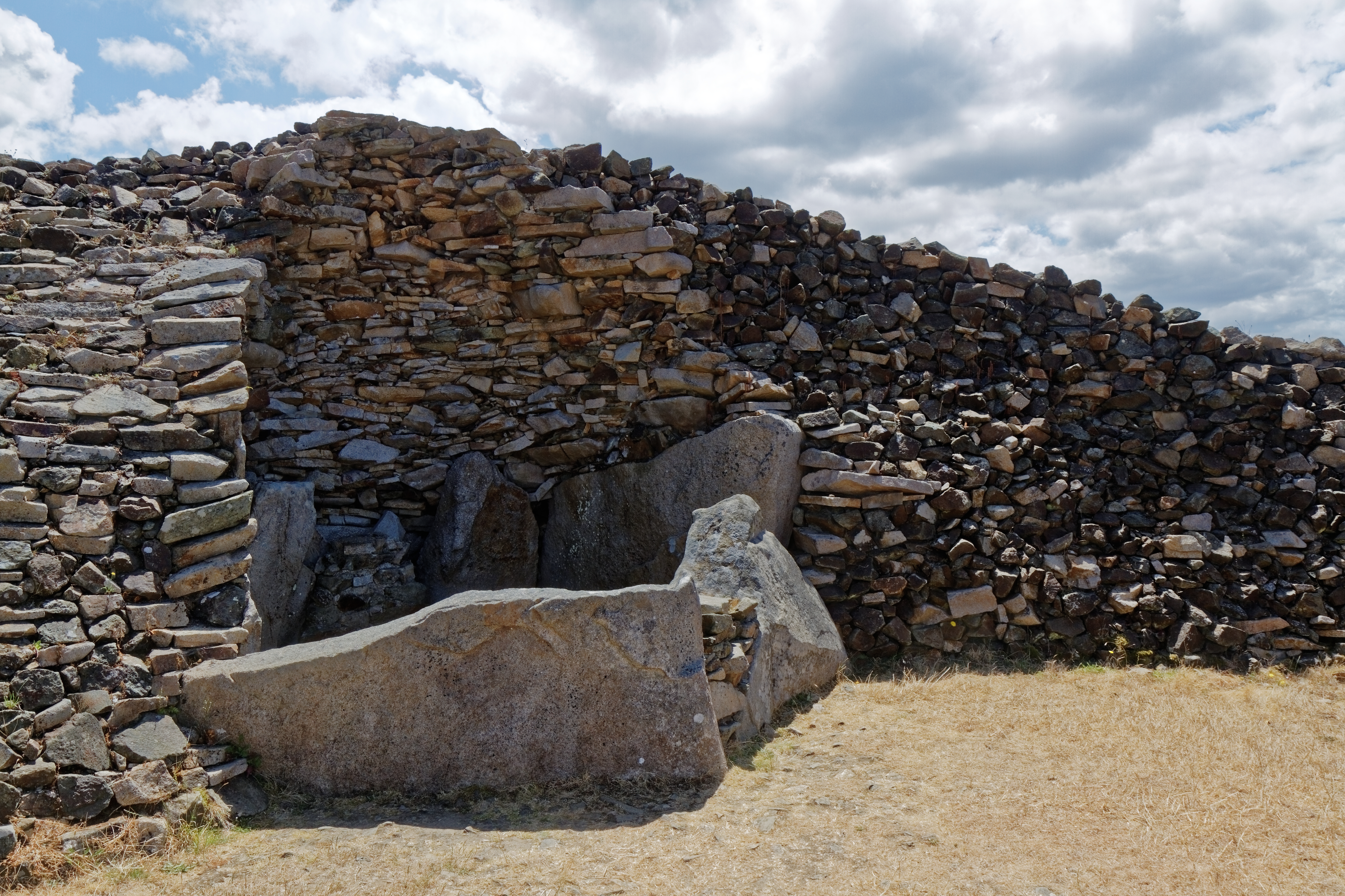 Panorama du Cairn de Barnenez à Plouezoc'h dans le Finistère. .